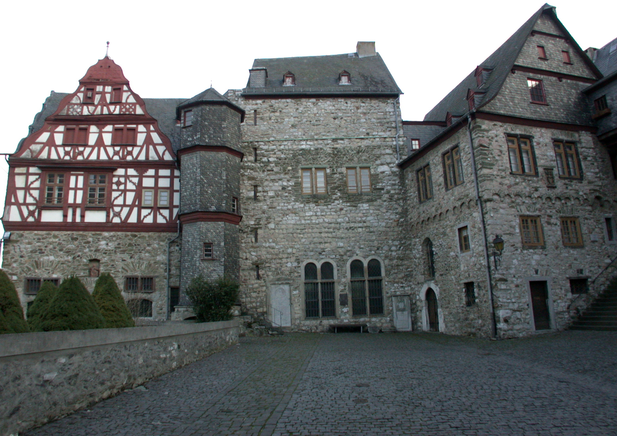 Burg Limburg, Deutschland, Blick in den Innenhof in Richtung Südosten